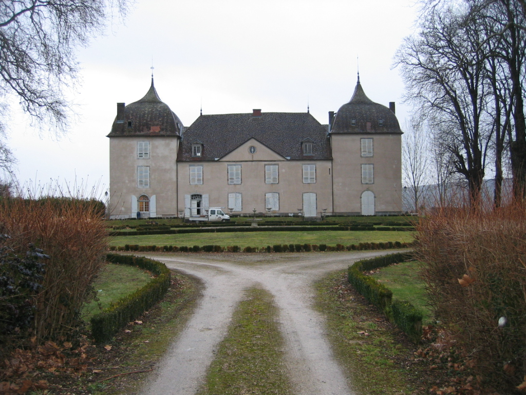 Chateau Roche-sur-Loue près d'Arc-et-Senans - Jura - France